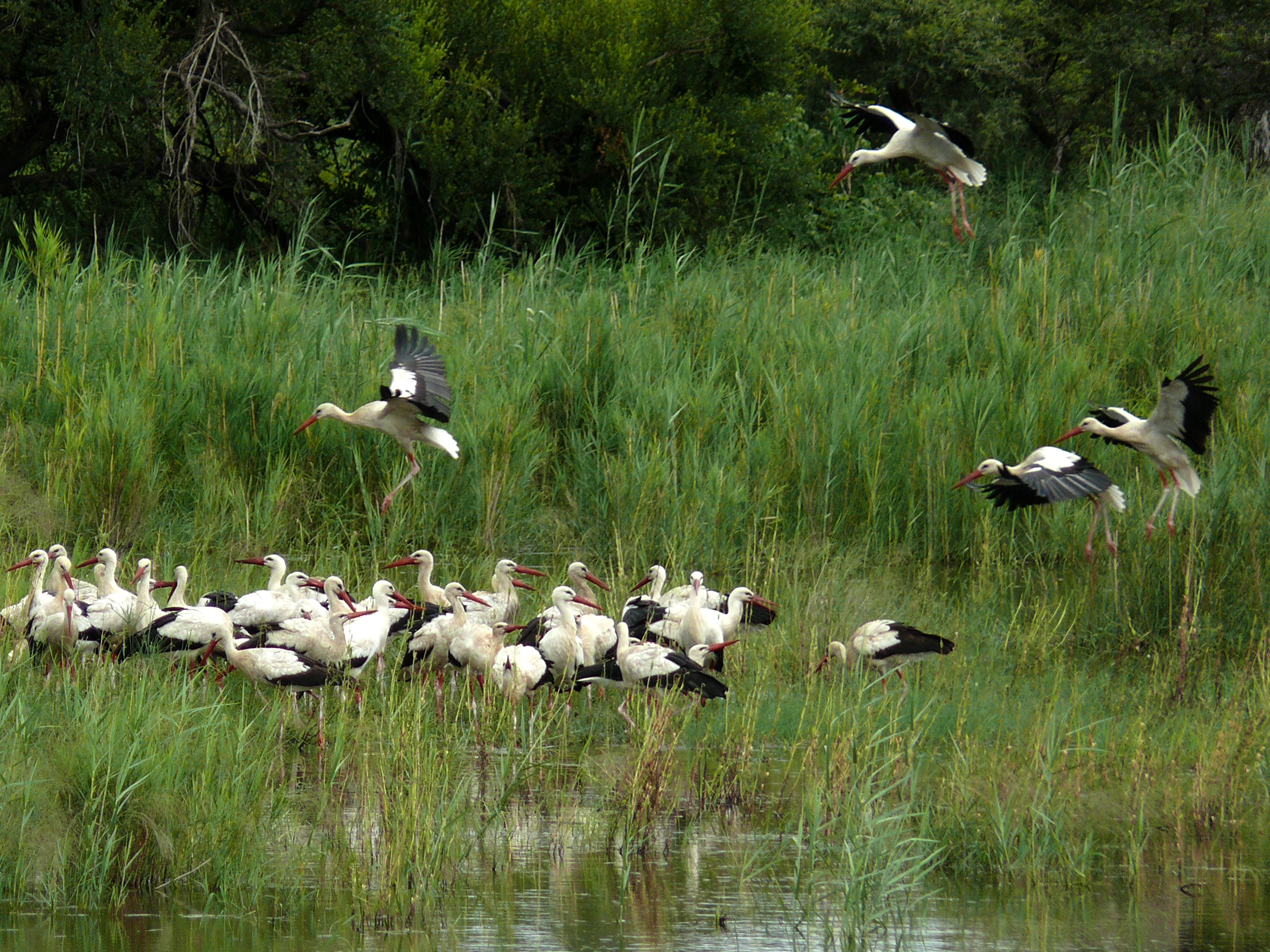 H9 West of Letaba, Kruger NP, SOUTH AFRICA